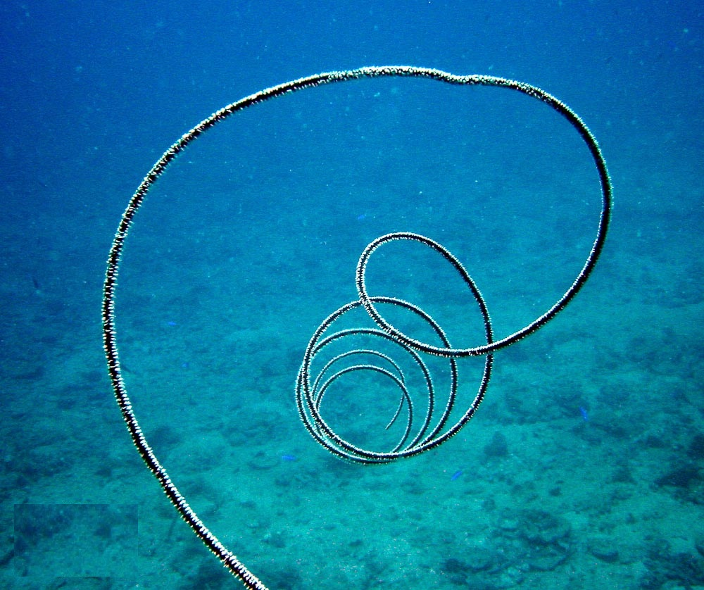 Cirrhipathes sp en Koh Phangan, Tailandia